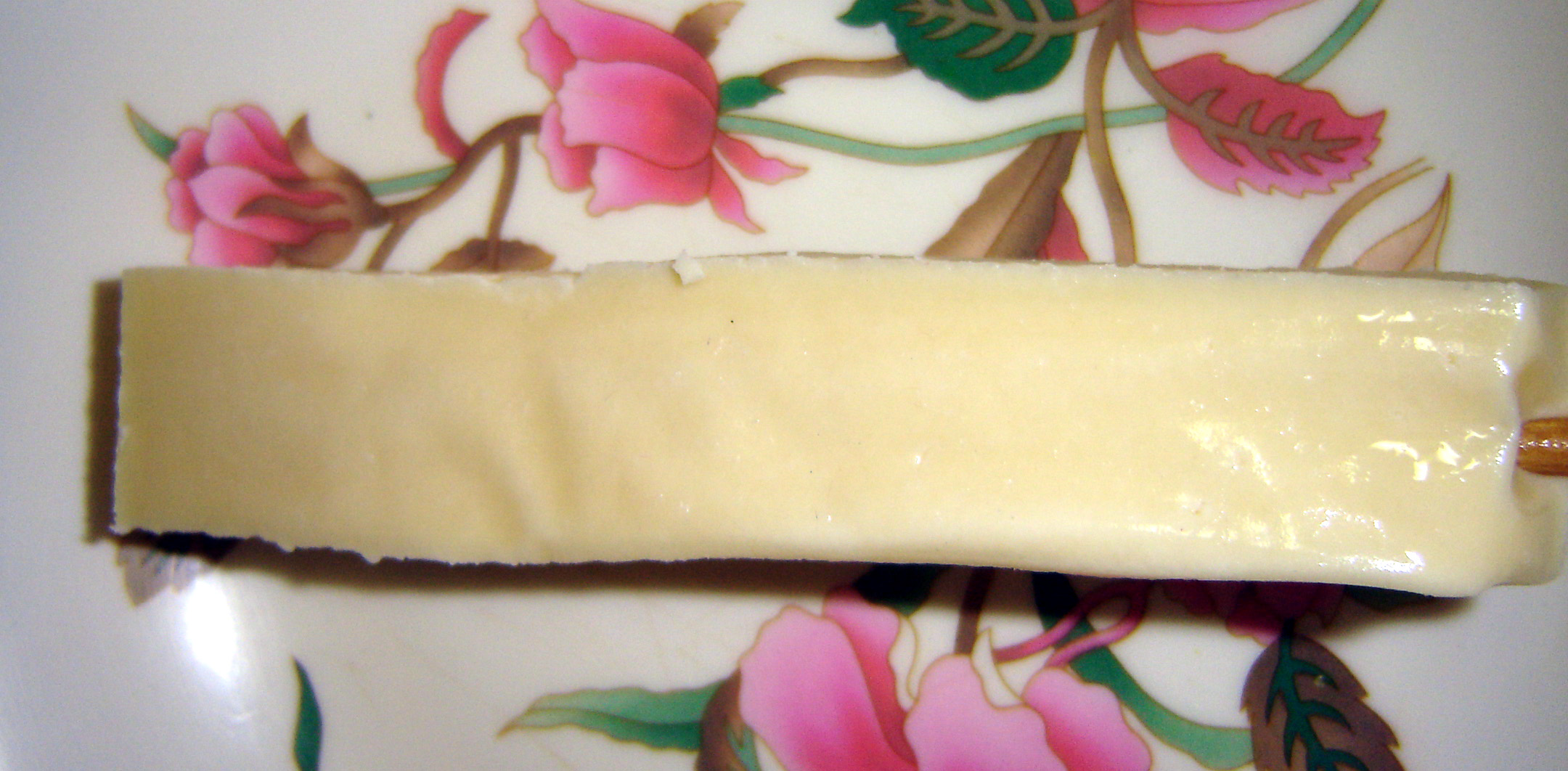 Coalho cheese (also known as queijo coalho)